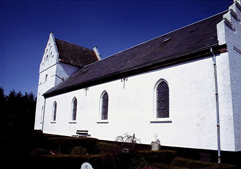 Søby Kirke i Danmark. Kirke Søby kirke